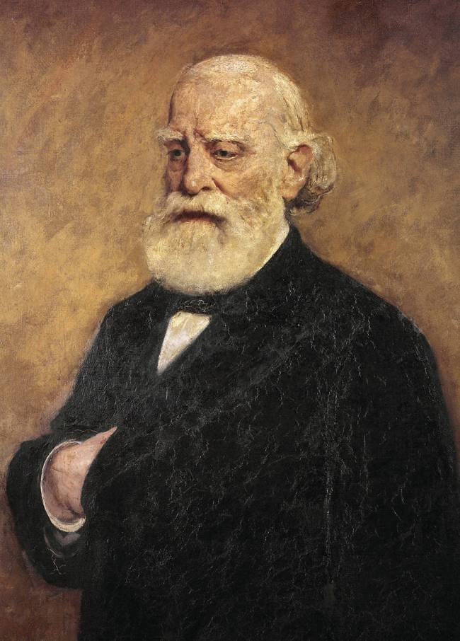 François-Vincent Raspail (1794-1878), chimiste et homme politique. Portrait peint par Francesco Miralles Galup.